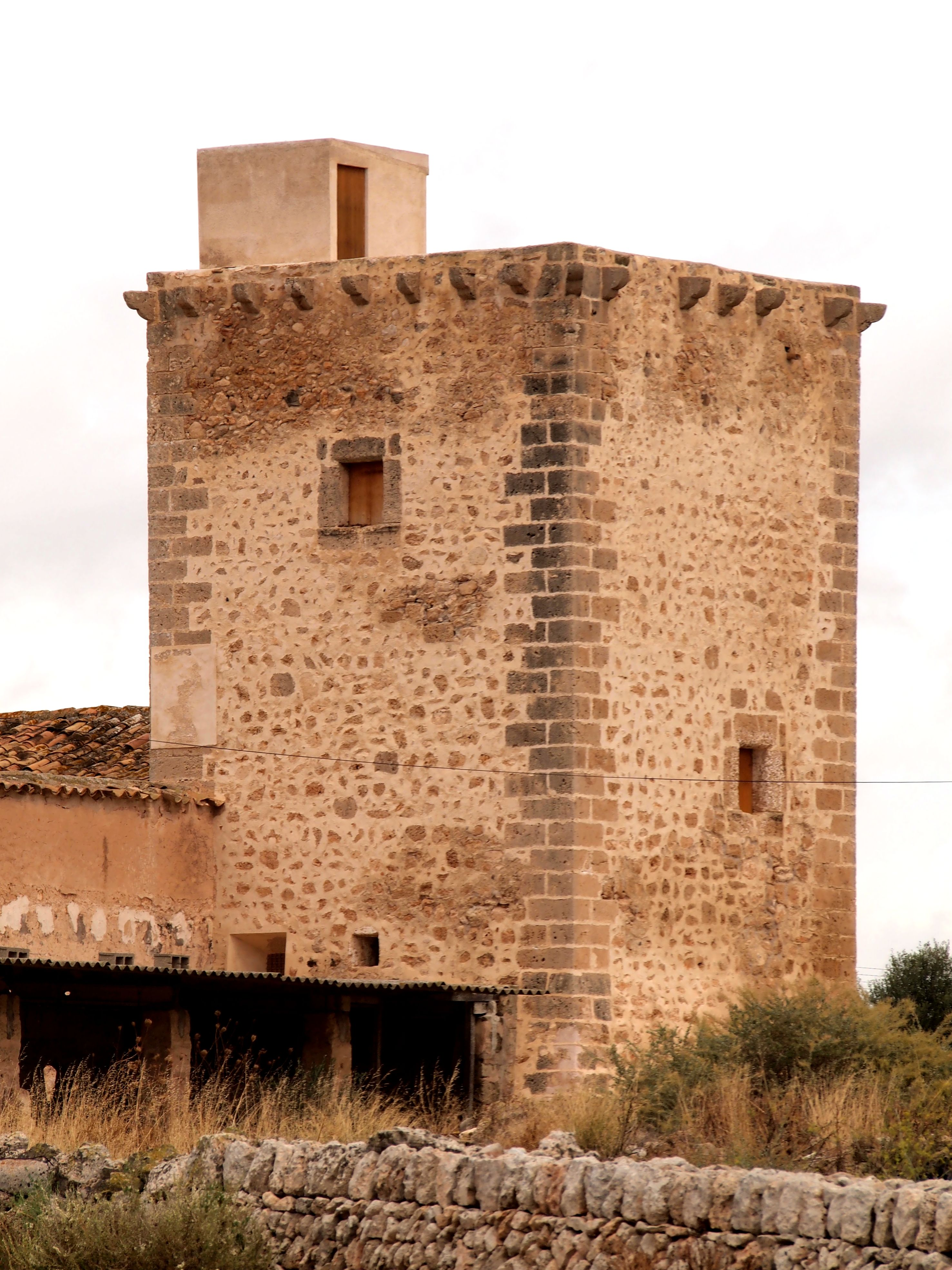 Torre de defensa de la possessió de Son Oms, del municipi de Palma